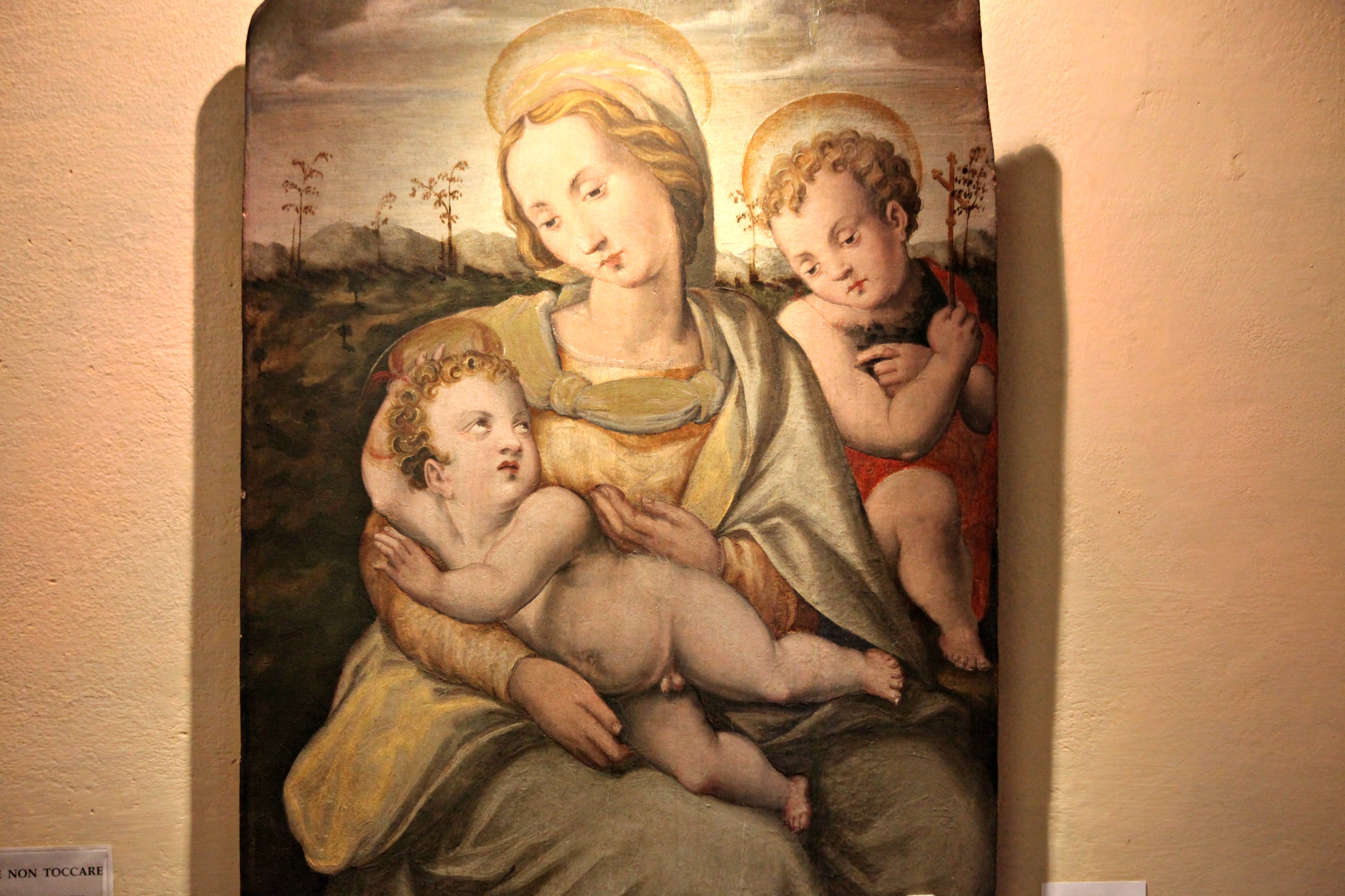 Madonna col Bambino e San Giovannino di ambito di Ridolfo del Ghirlandaio